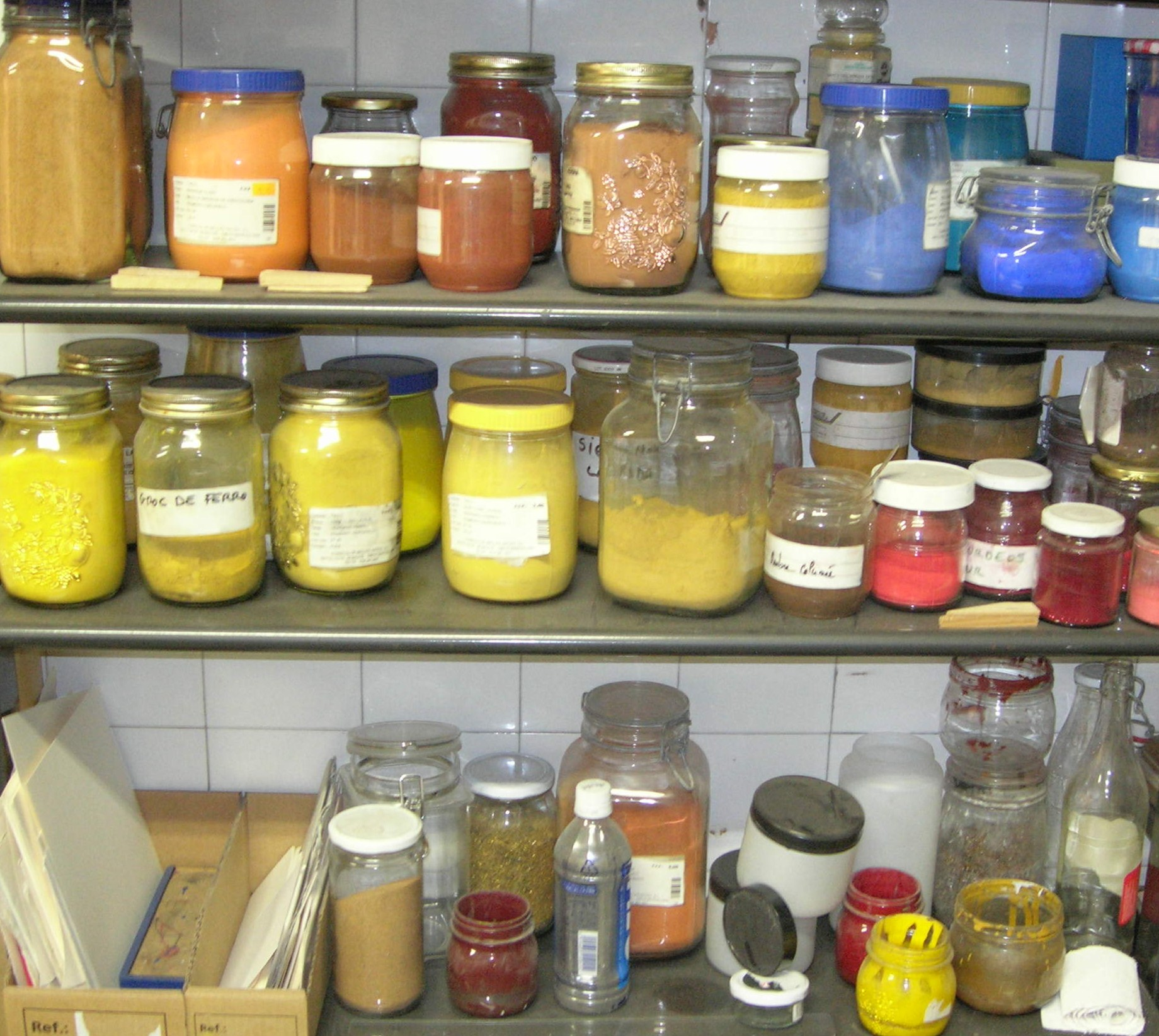 Atelier du peintre catalan Assumpcio 0ristrell, 2009